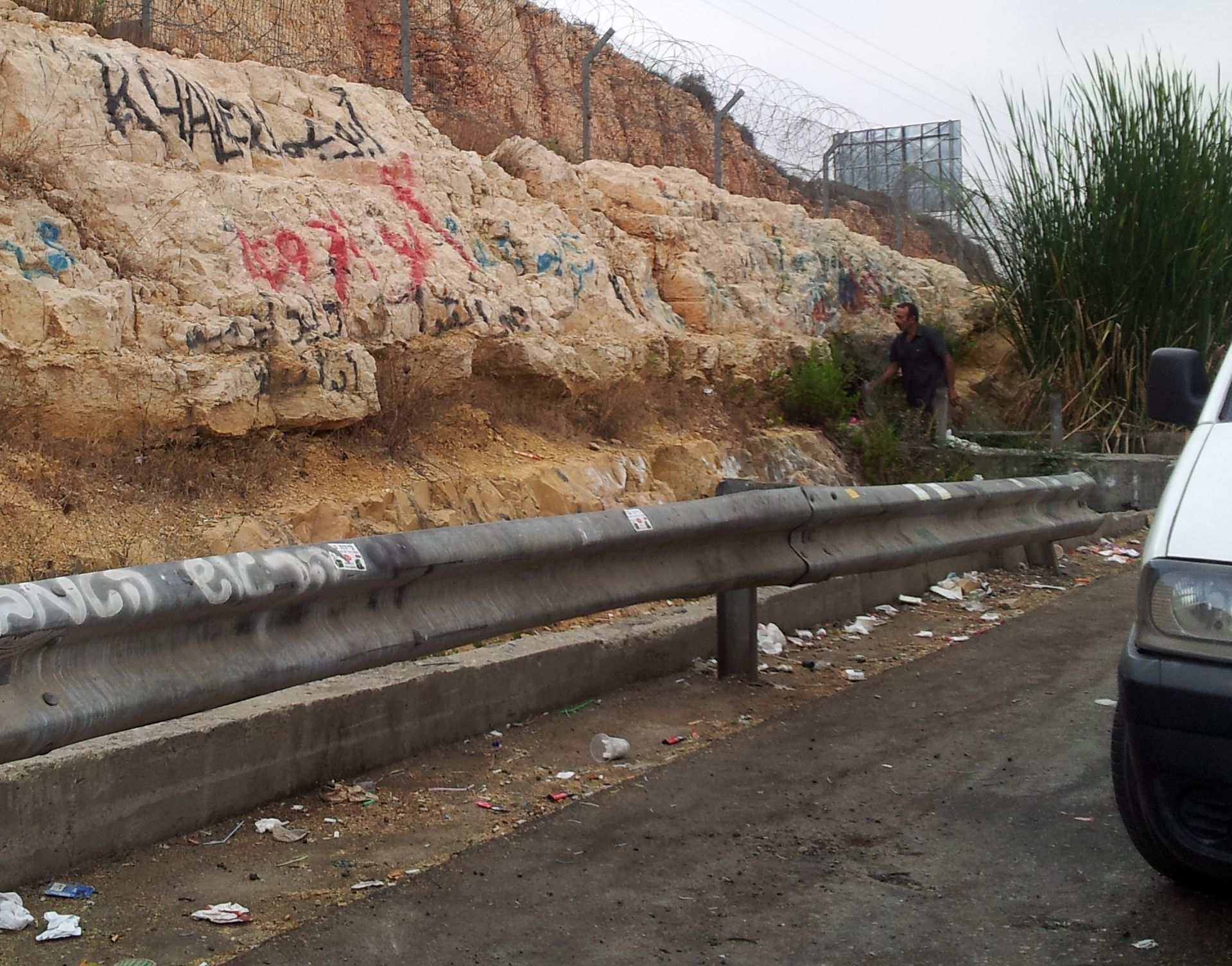 מעיין בכביש 443